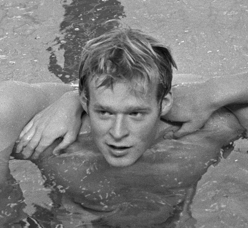 Eurovisie-zeslandenzwemtoernooi te Bussum, Gunnar Larsson